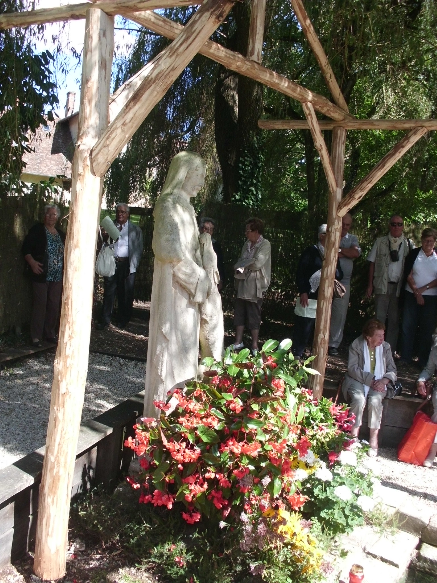 Statue de Saint-Gilles à Aiguevives (Faverolles-sur-Cher, Loir-et-Cher)